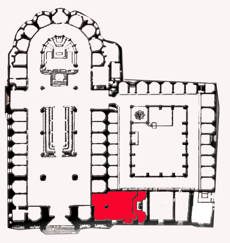 Situació de la capella del Santíssim dins de la catedral de Barcelona